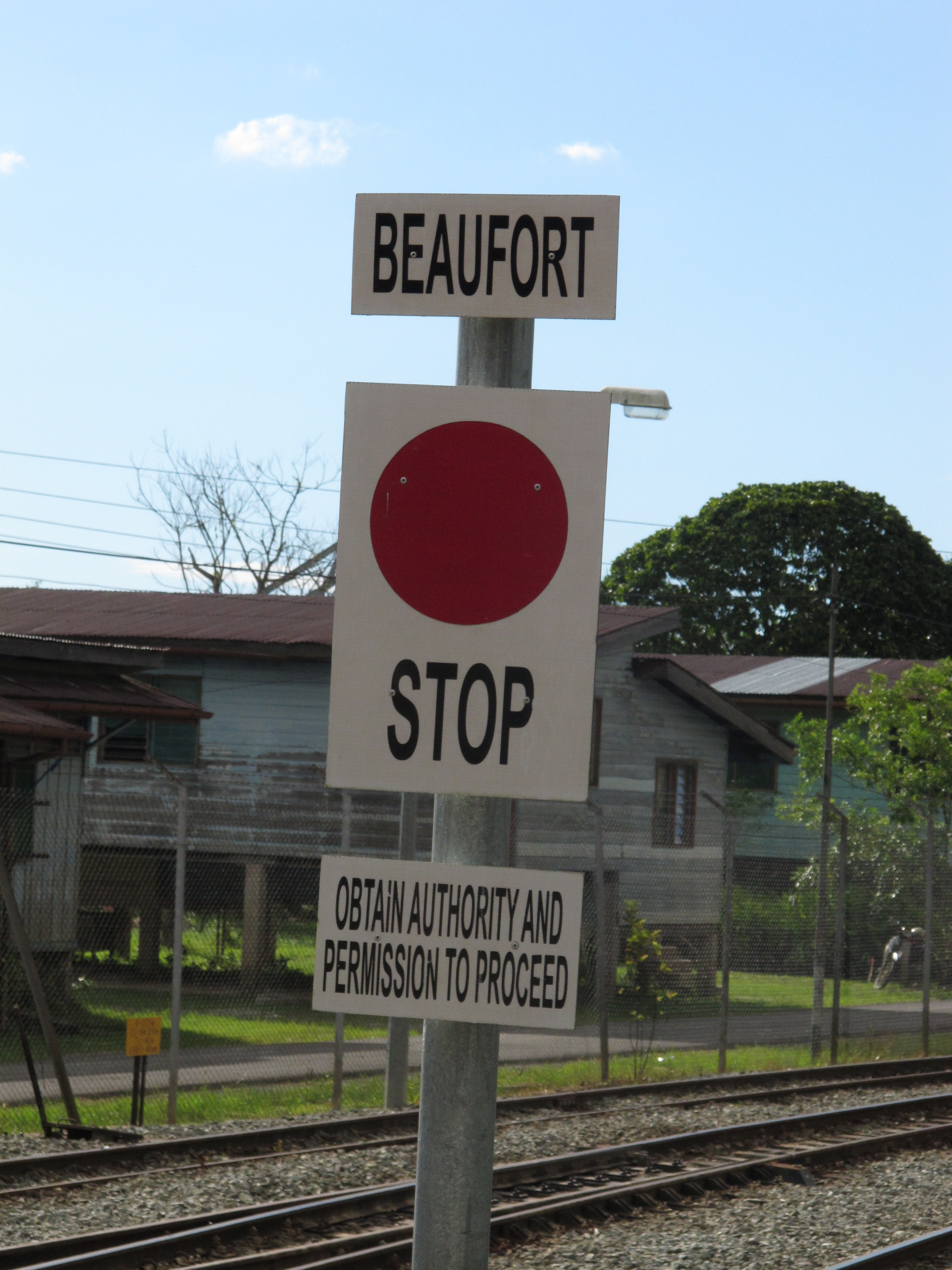 Beginn des Streckenabschnittes Beaufort-Membakut. Blocksignal für den Zugführer, Weiterfahrt erfordert die Übergabe einer schriftlichen Streckenfreigabe.